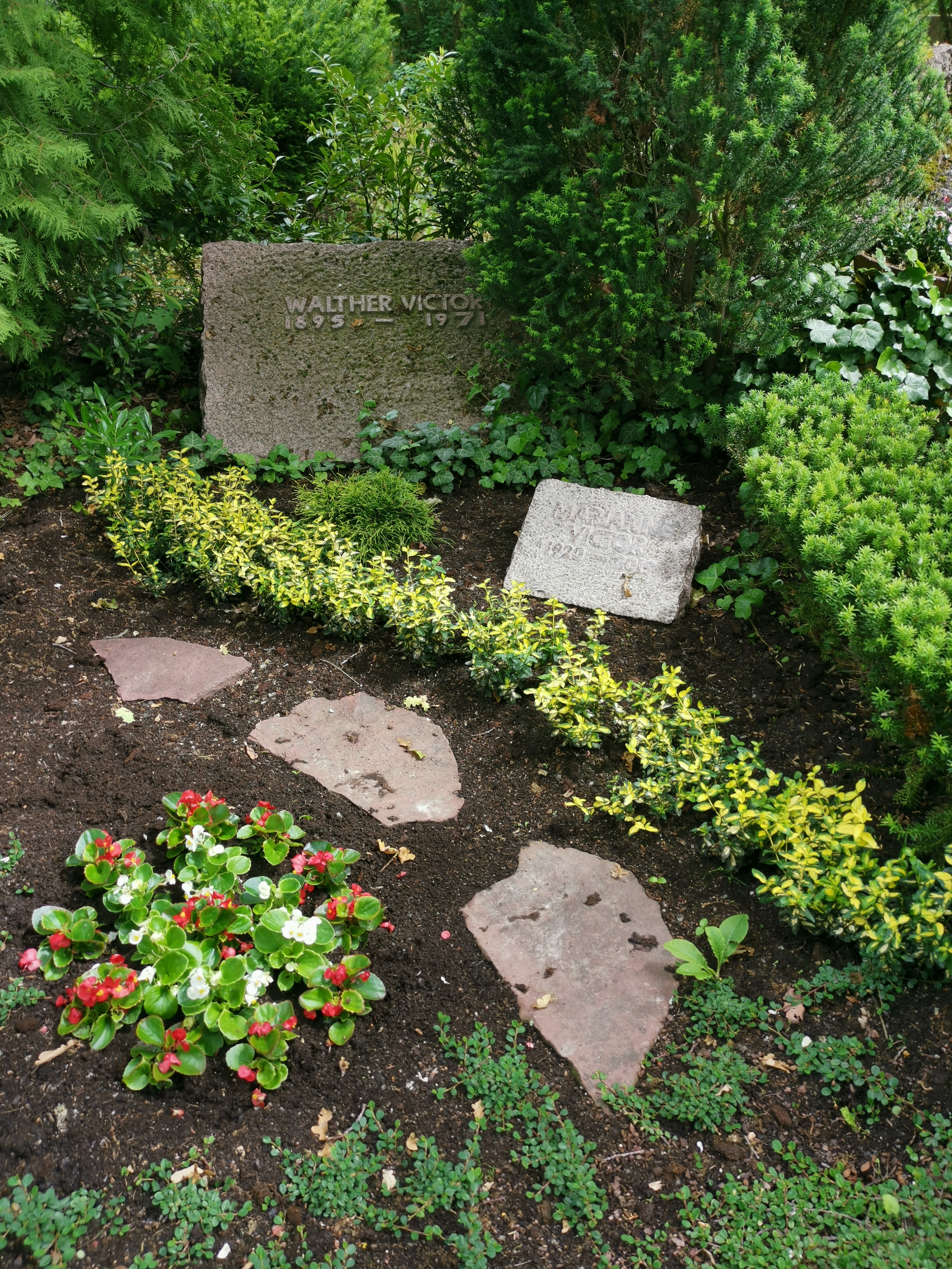 Grab Walther Victor; Historischer Friedhof Weimar